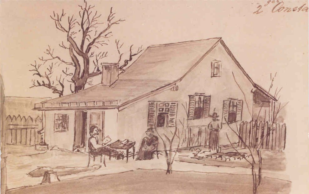 Hermann Ferdinand von Bieberstein (1824-1907) with his 2nd wife Constanze and his son Richard beside his farm house in Fredericksburg